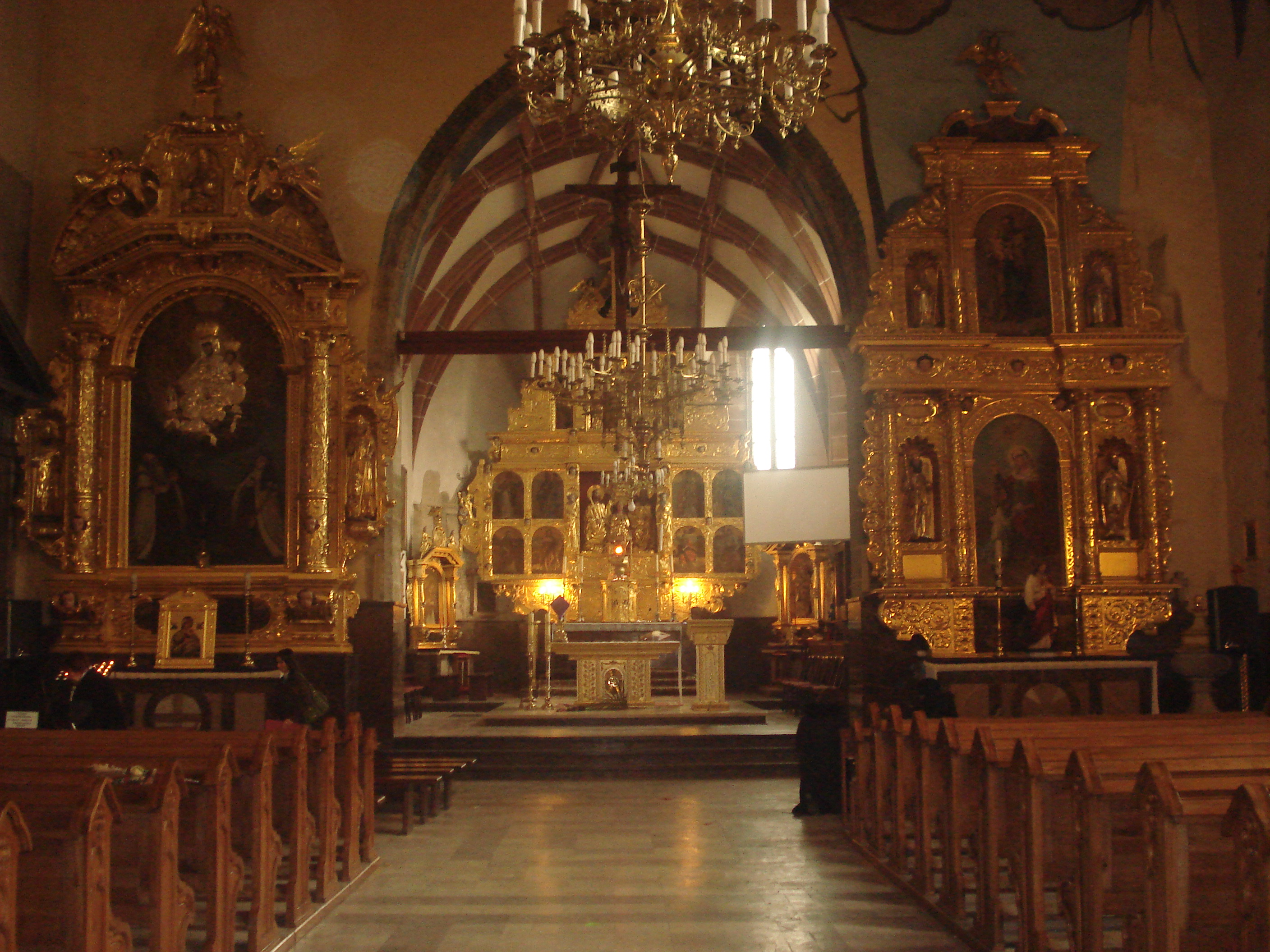 Nawa główna kościoła św. Zygmunta w Szydłowcu